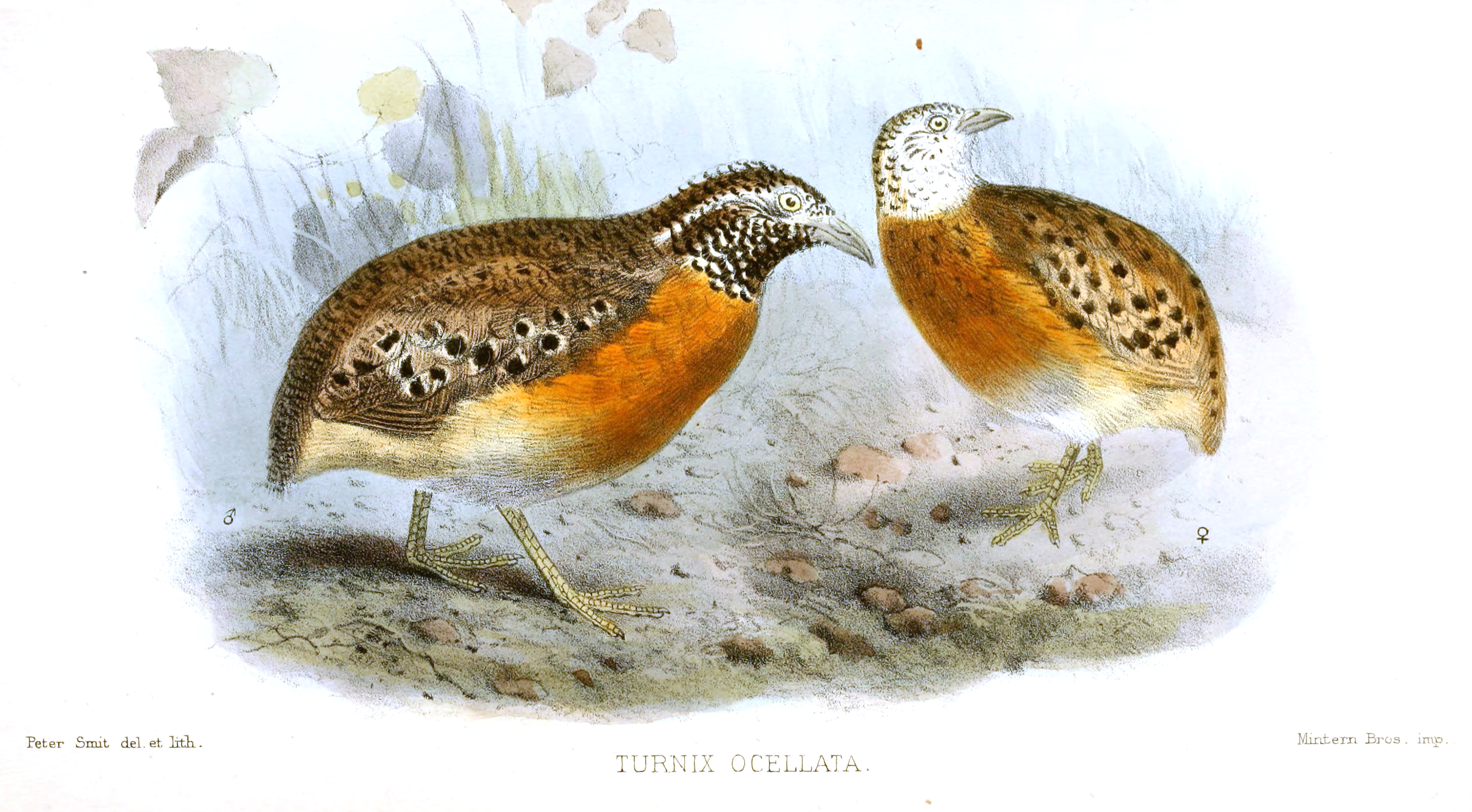 Turnix ocellata